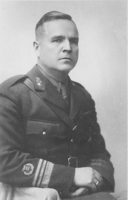 Kolonel-leitnant Oskar Luppe. Pärast vabadussõda Mereväe Ekipaazhi ülem. 1934 7. Jalaväerügemendi III pataljoni ülem. 1934–1940 Välipataljoni ülema abi. Arreteeriti NKVD poolt. Pärast II maailmasõda tuli vangilaagrist Eestisse tagasi.